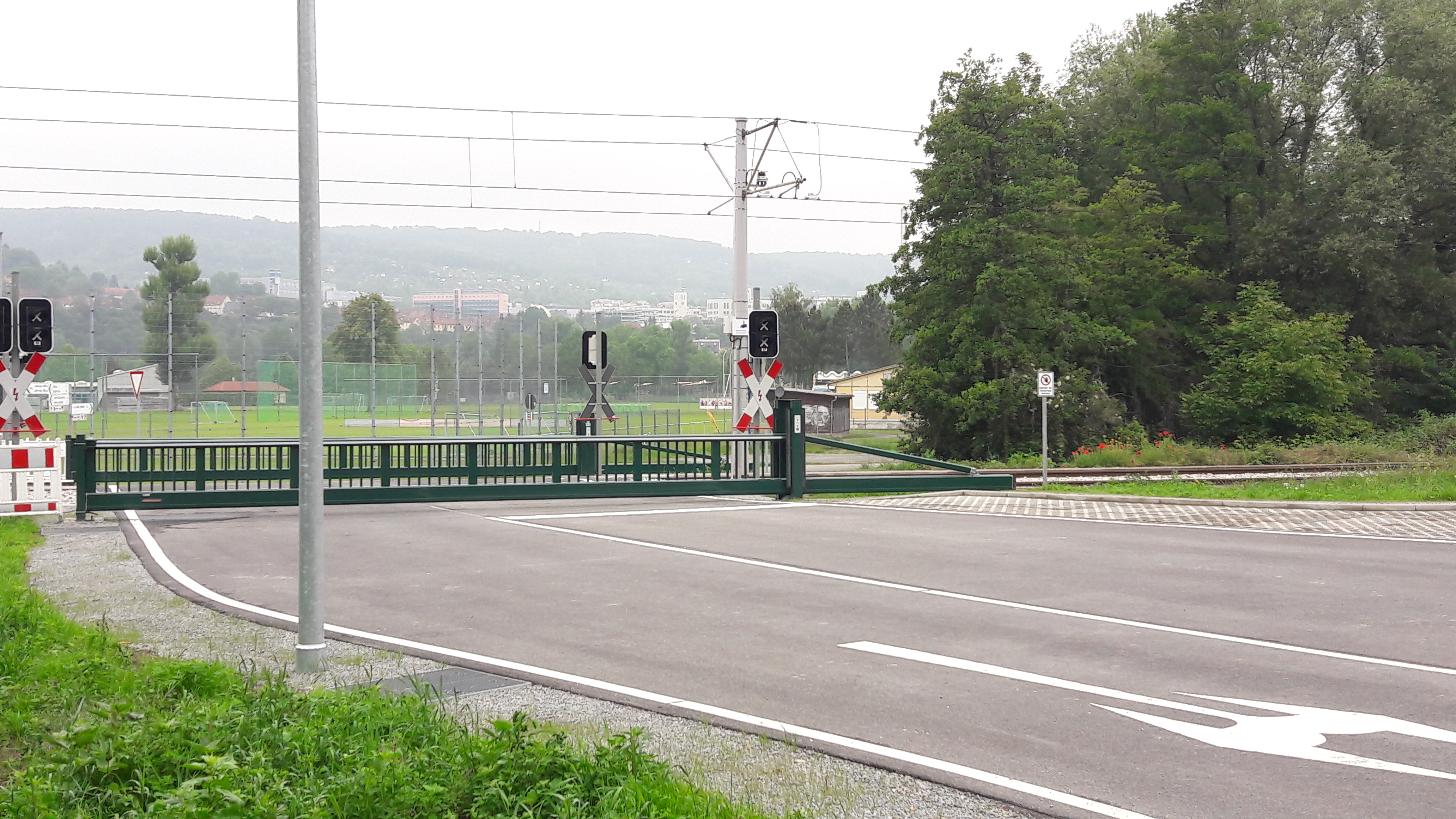 Neue Süd-Zufahrt zur Oberaue von der Stadtrodaer Straße aus, 11. Juni 2020, noch nicht eröffnet